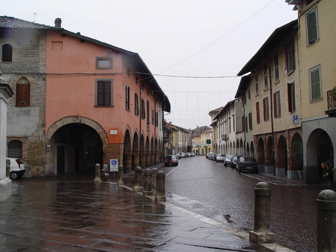 Centro Storico di Martinengo